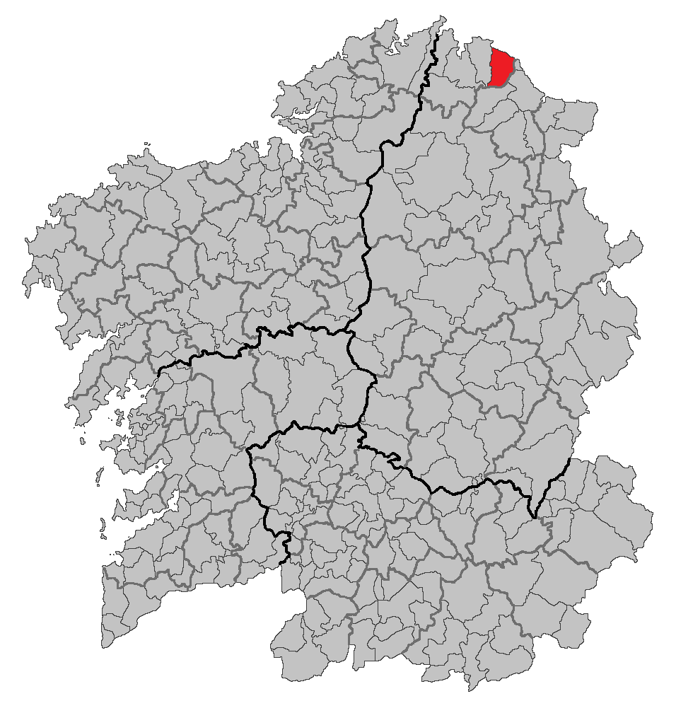 Mapa coa localización do concello de Cervo.